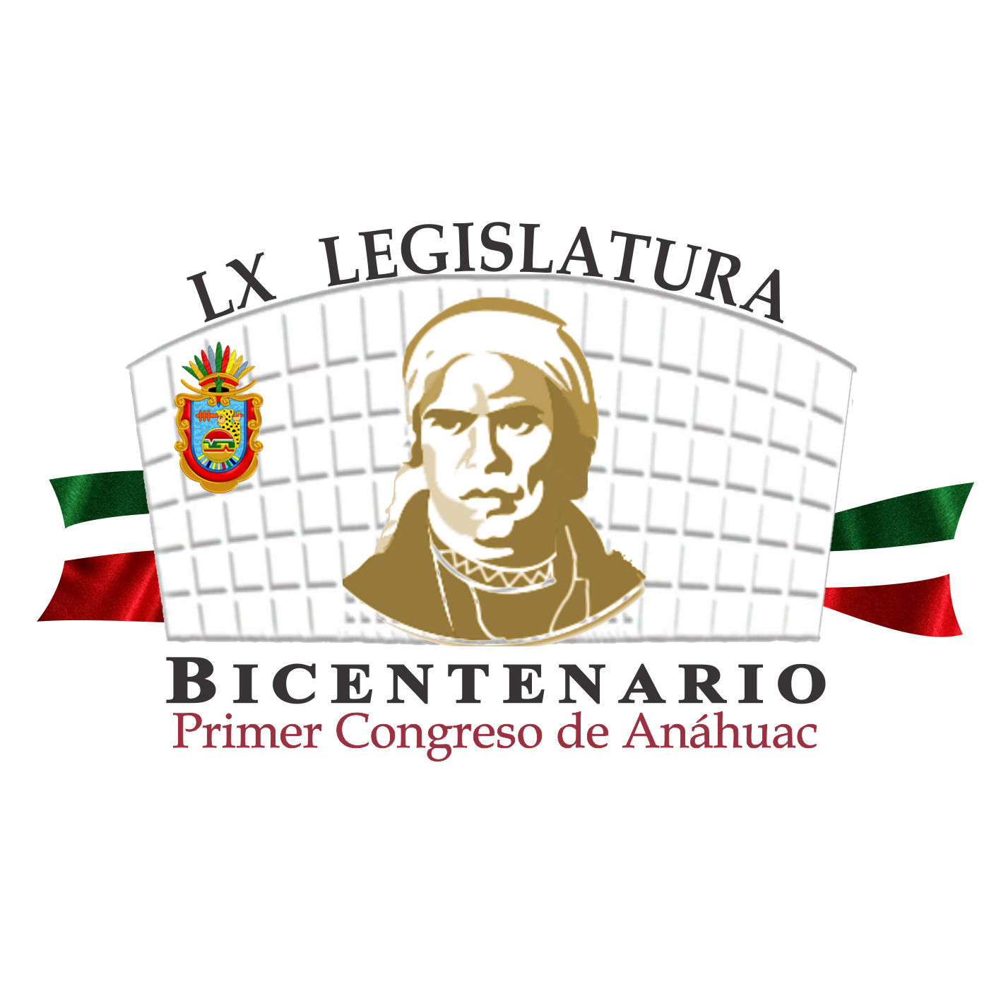 Logo de la LX Legislatura al Honorable Congreso del Estado Libre y Soberano de Guerrero